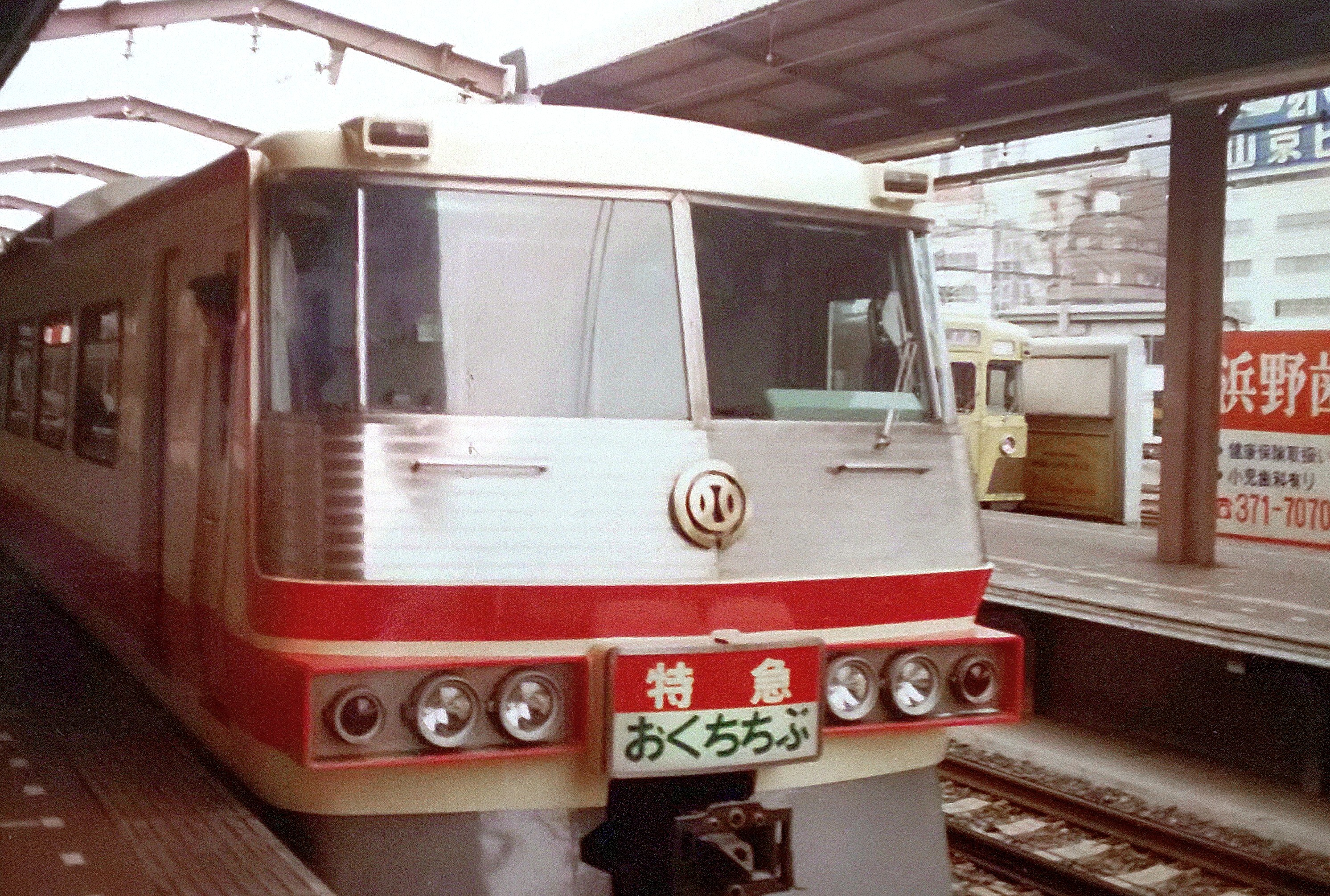 おくちちぶ号 西武新宿駅 1981年10月